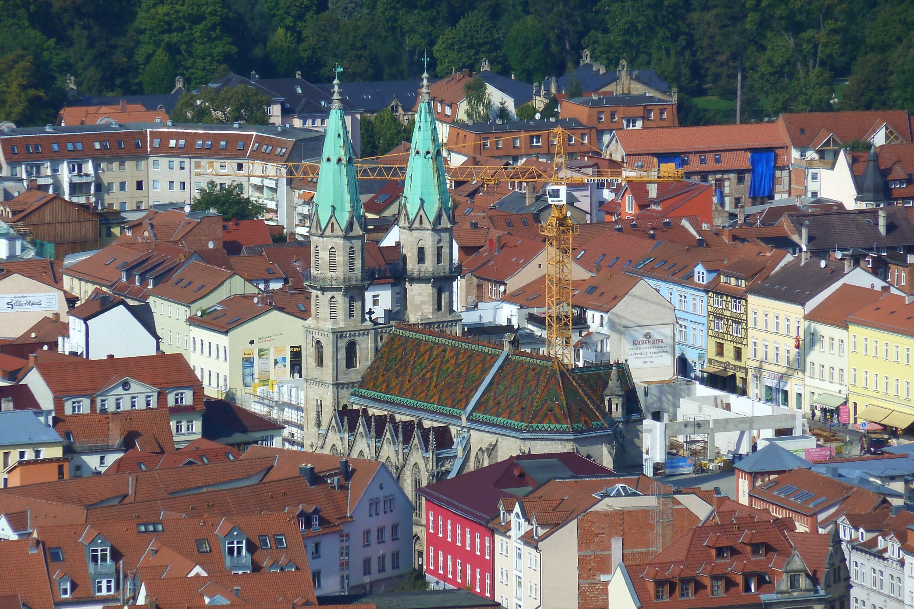 Der gotische Chor von 1455 mit Buntglasfenstern von Gerhard Olbrich in der Stadtkirche Meiningen